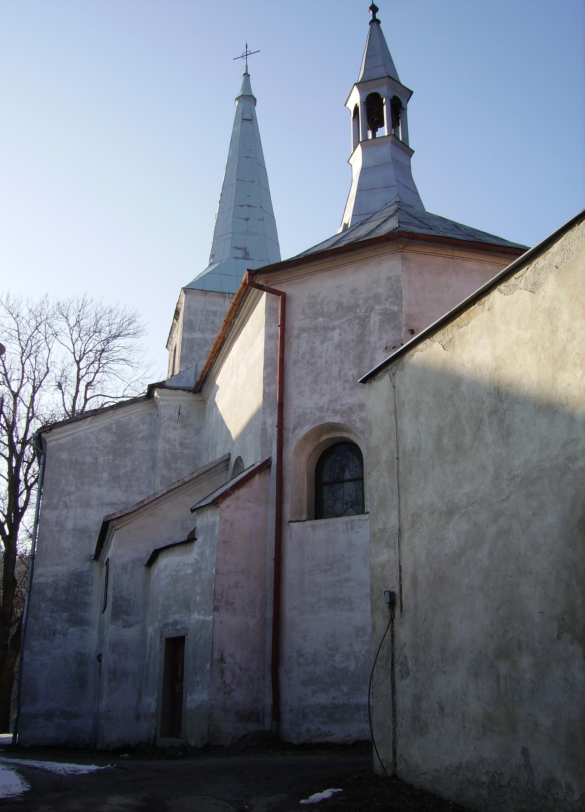 Kostel sv. Bartoloměje, Náměstí v Potštátě